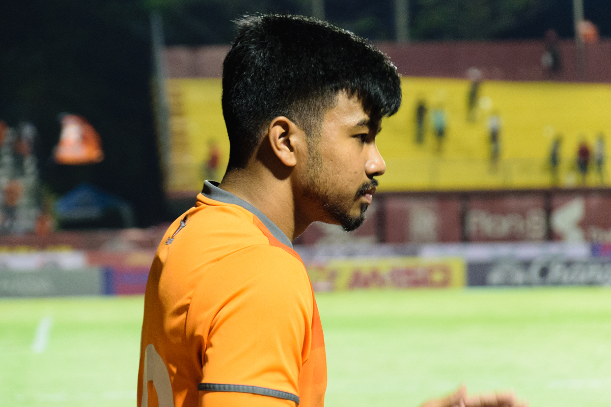 Nont Muangngam